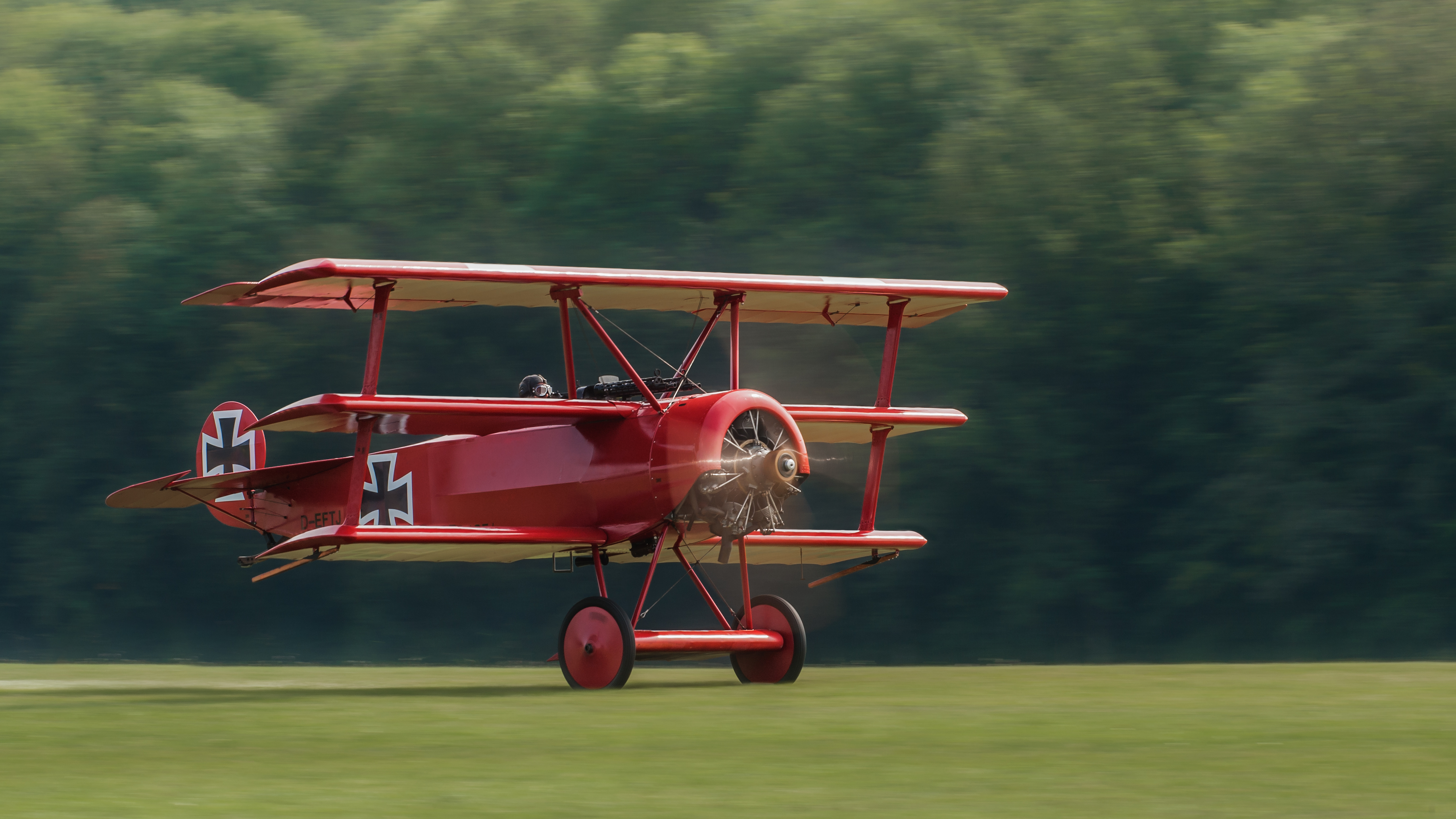 Fokker DR.1 Replika beim Start beim Oldtimer Fliegertreffen, 2013 am Flugfeld Hahnweide bei Kirchheim unter Teck